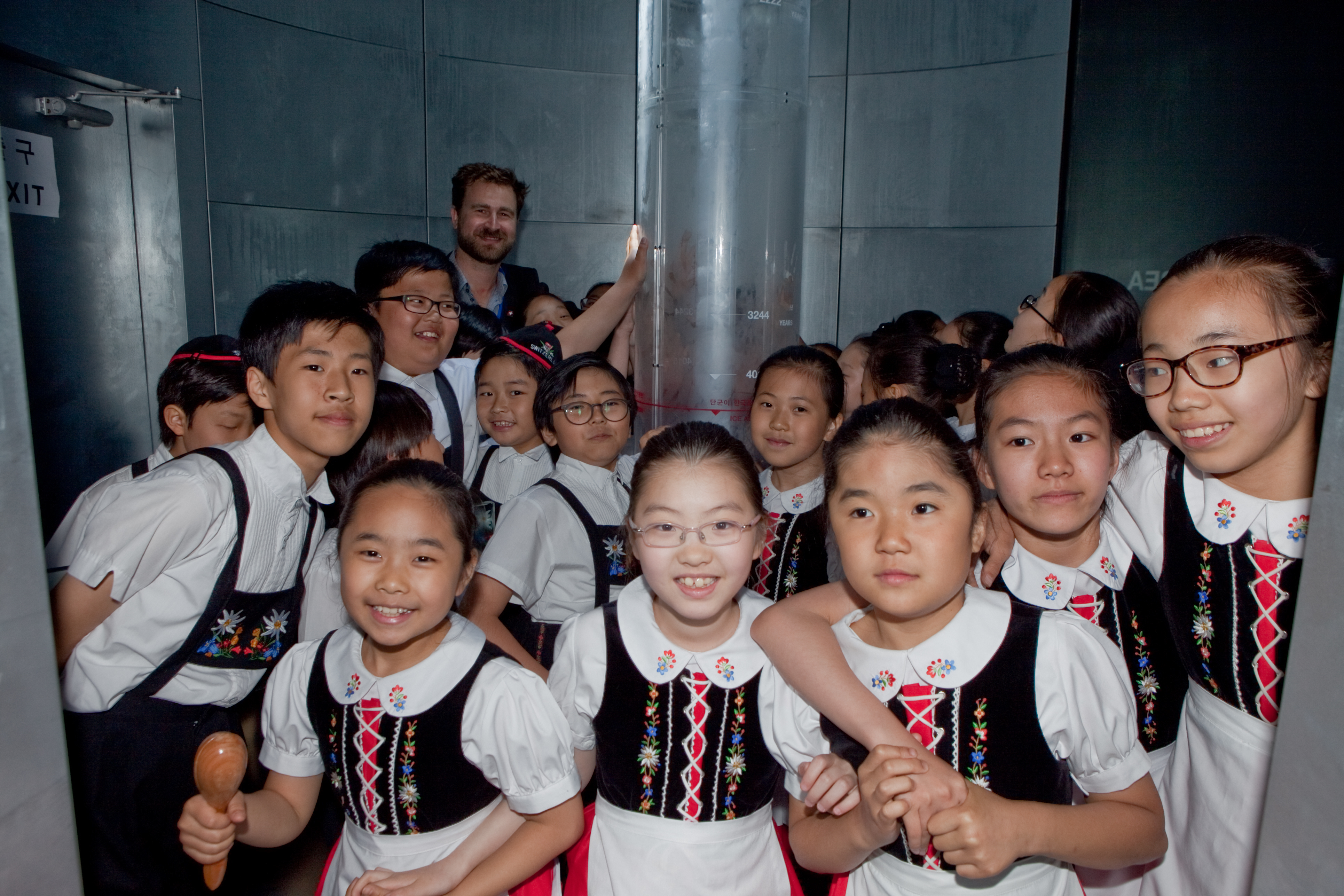 Koreanische Kinderjodelgruppe am Schweizer Nationen am 21. Mai 2012 im Raum mit dem Eisbohrkern